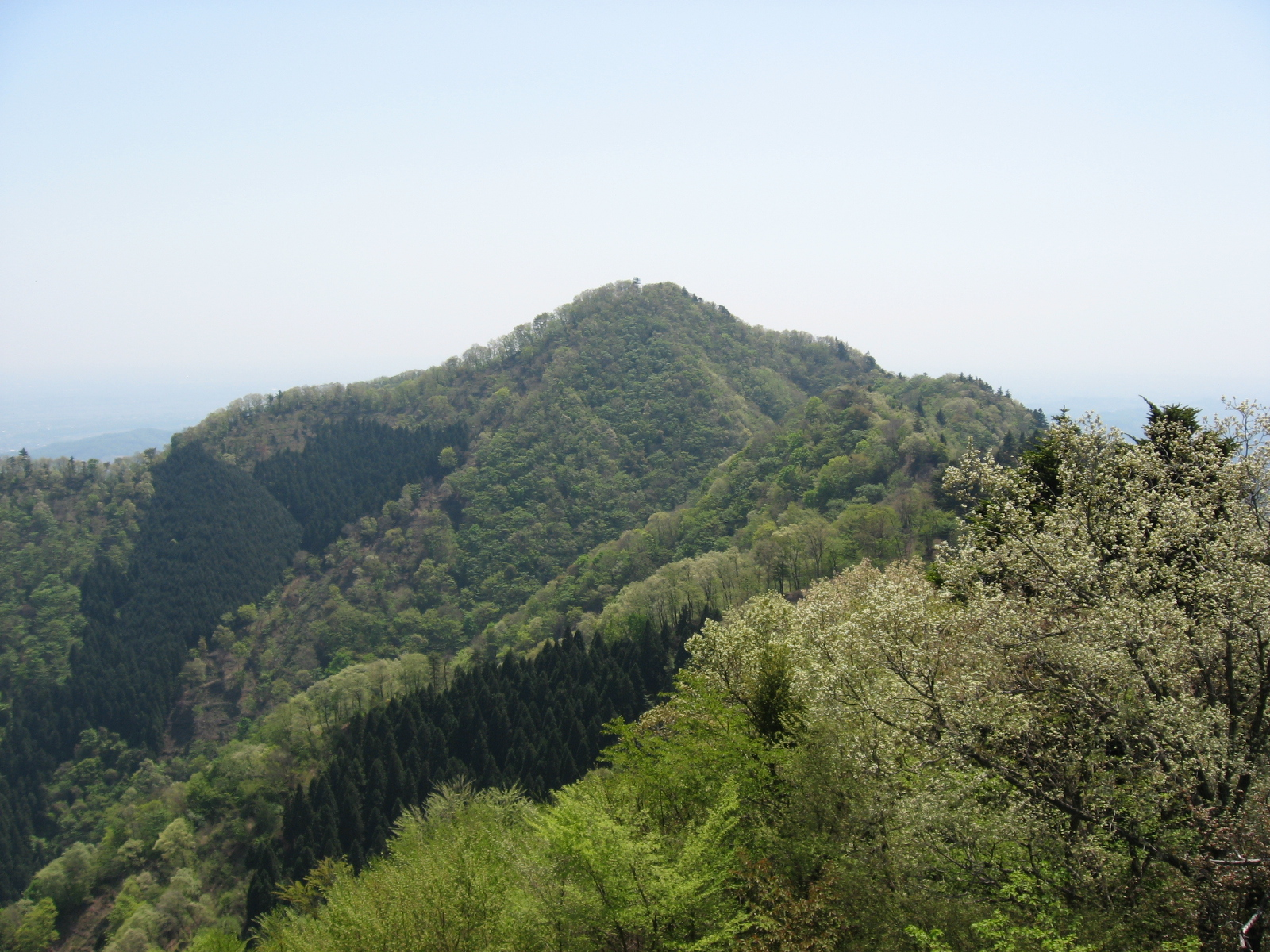 高取山展望台から望む仏果山